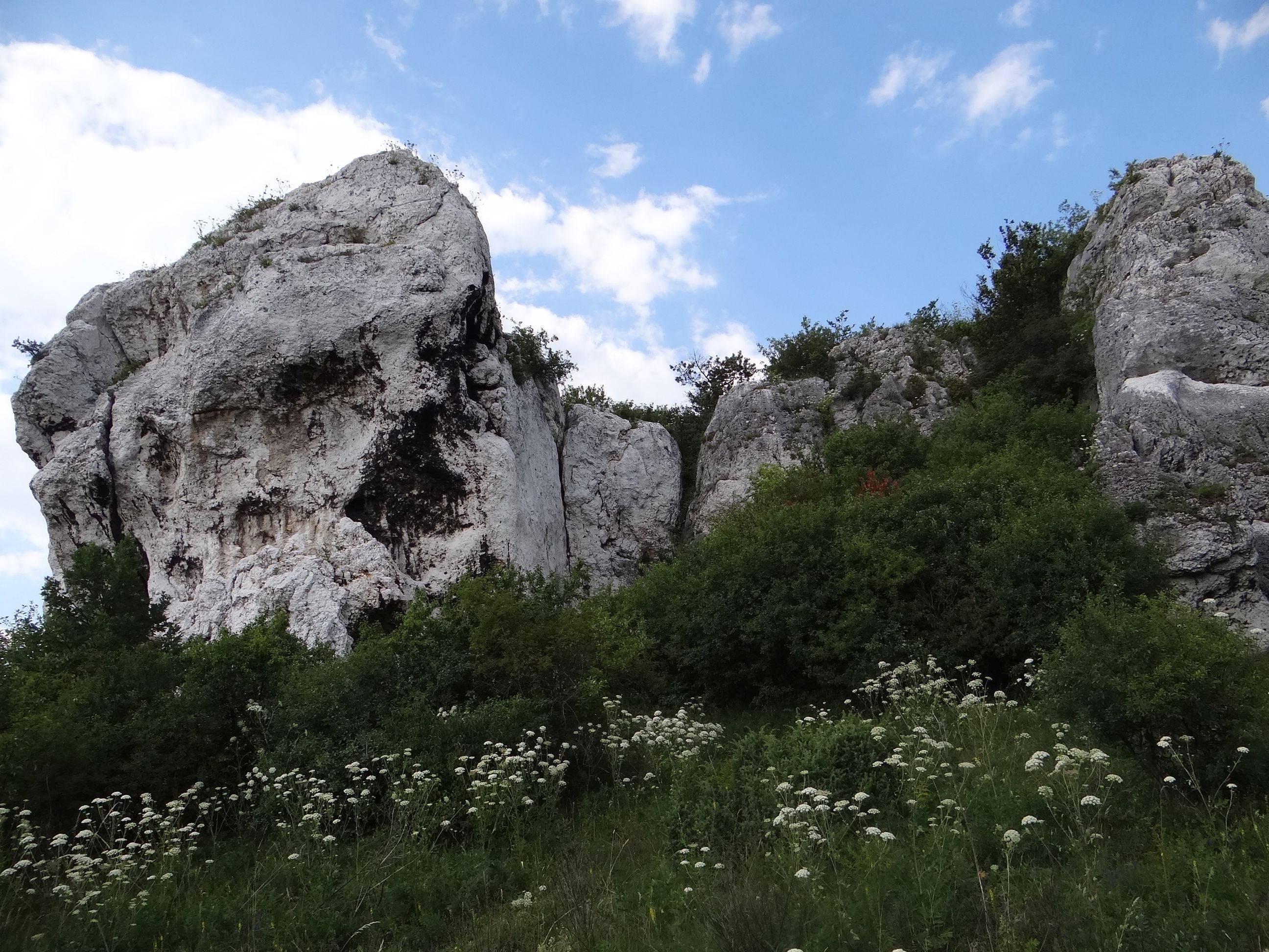 Studnisko i Biały Filarek w grupie skał Rzędkowickich